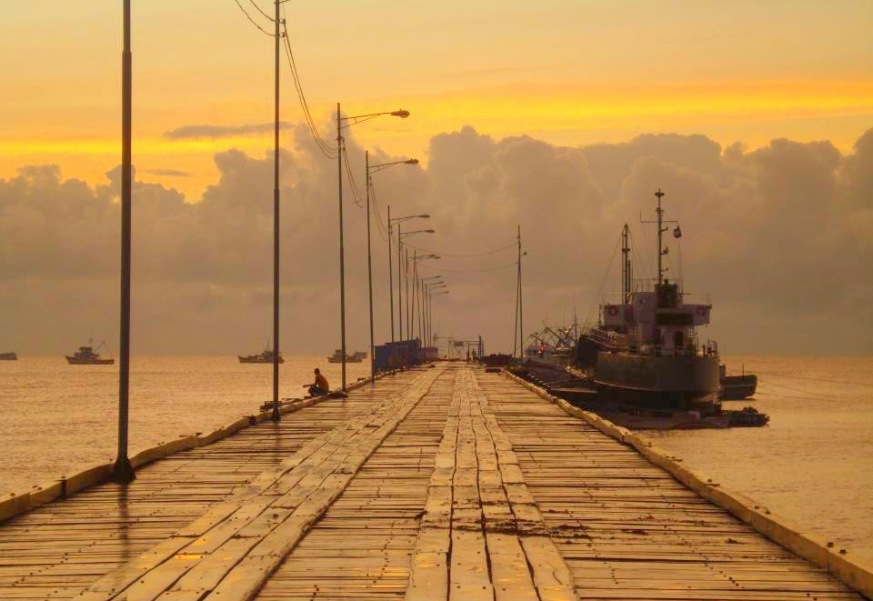 El muelle de Puerto Cabezas la principal fuente de Economica de la ciudad.